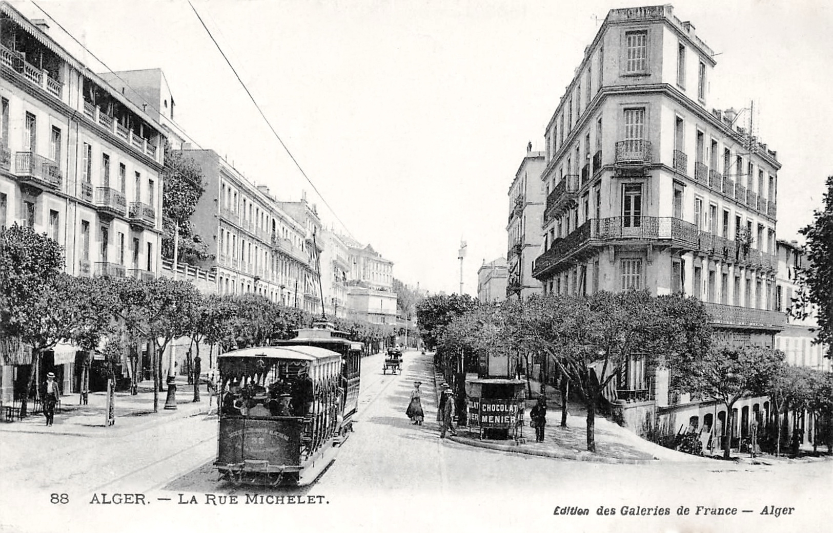 Alger, rue Michelet, vers 1910